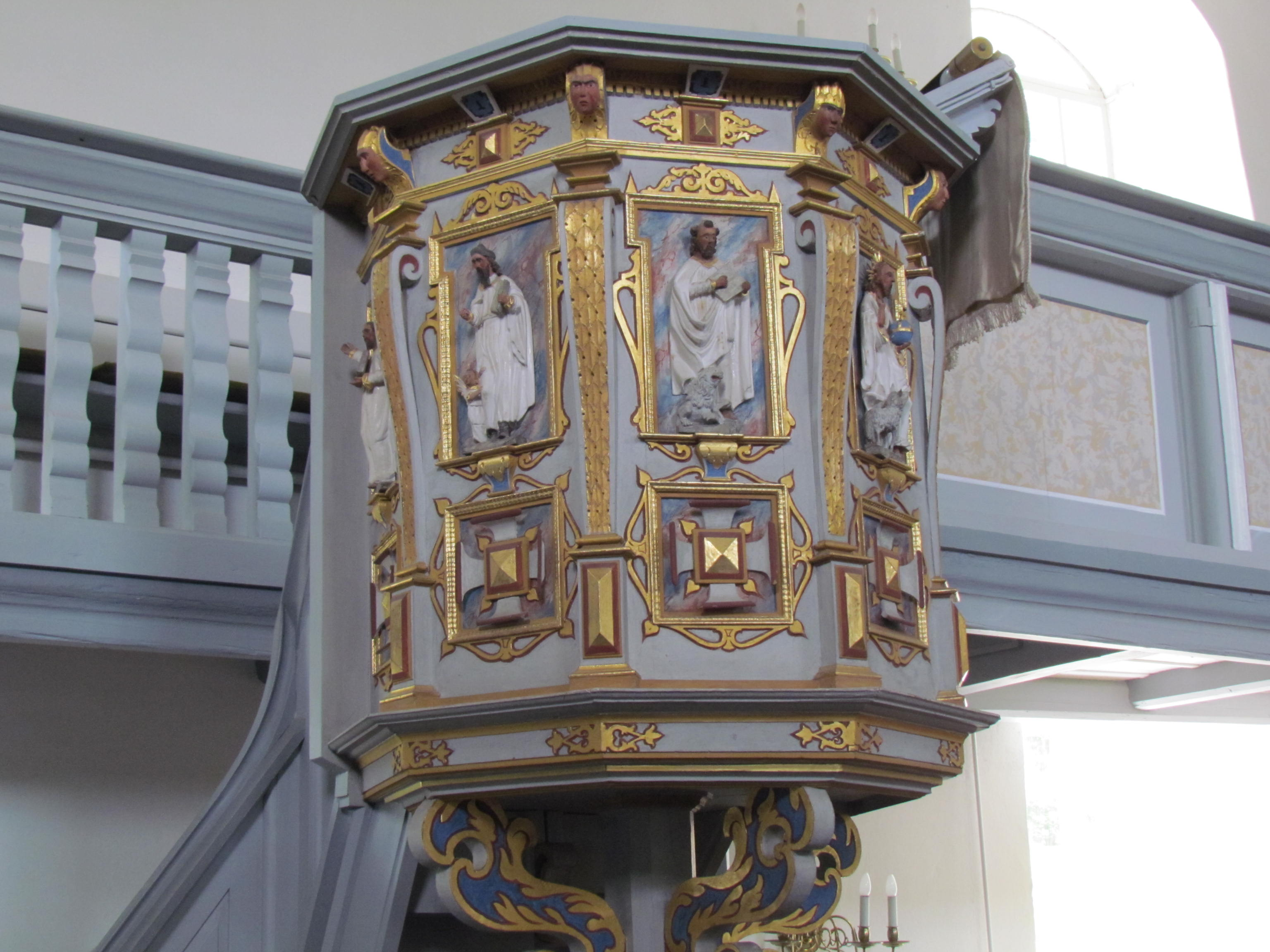 Die im Jahr 1658 gestiftete Kanzel der Bockauer Kirche zeigt Schnitzwerk mit Engelsköpfen und Relieffiguren - Christus, Moses, Evangelisten, im Ganzen eine sehr schöne Farbgebung